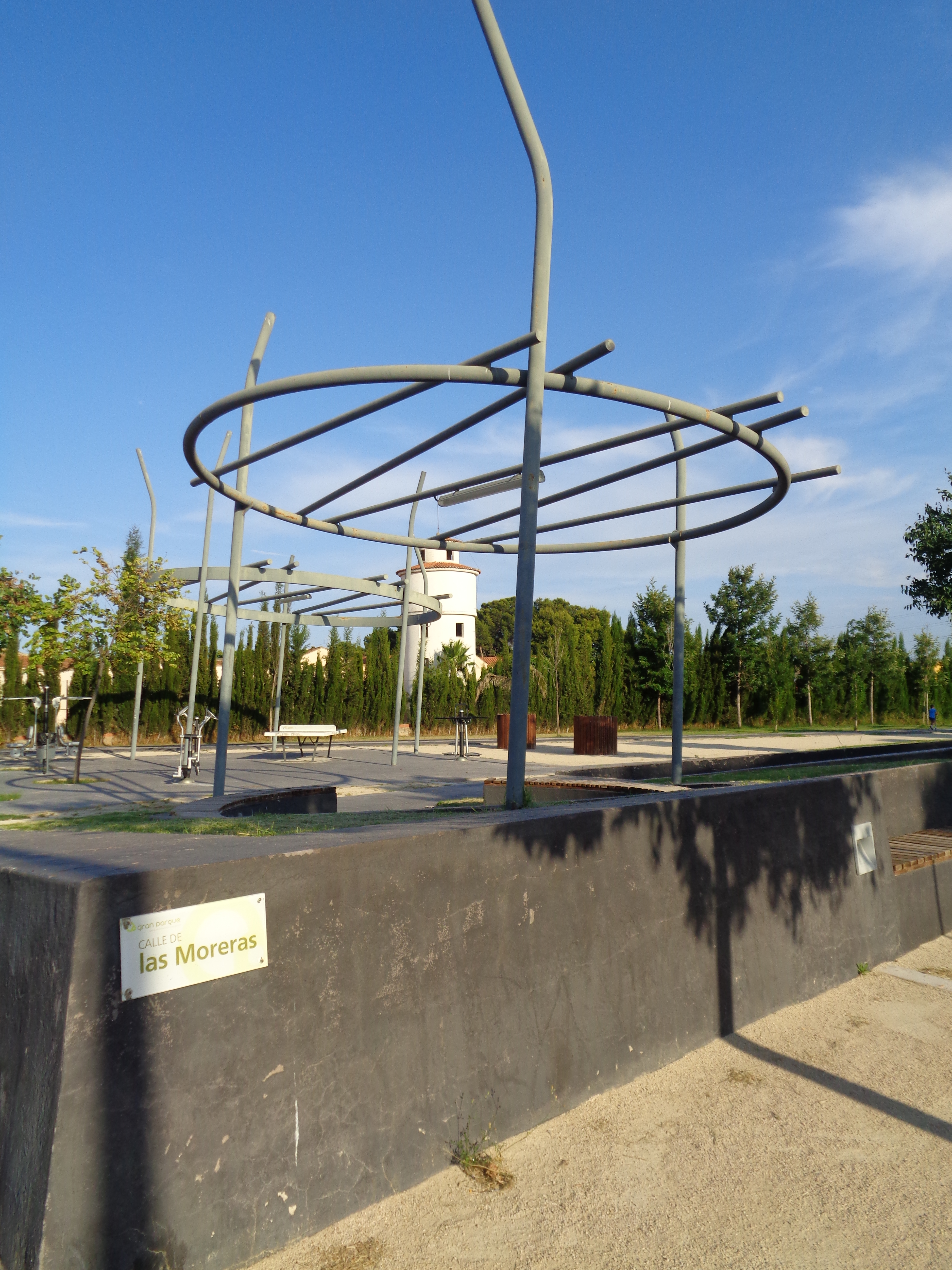 Sant Antoni de Benaixeve.